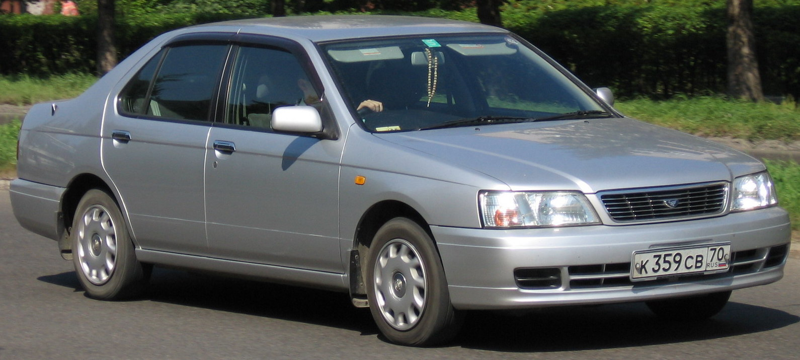 Photo taken in Seversk, Russia